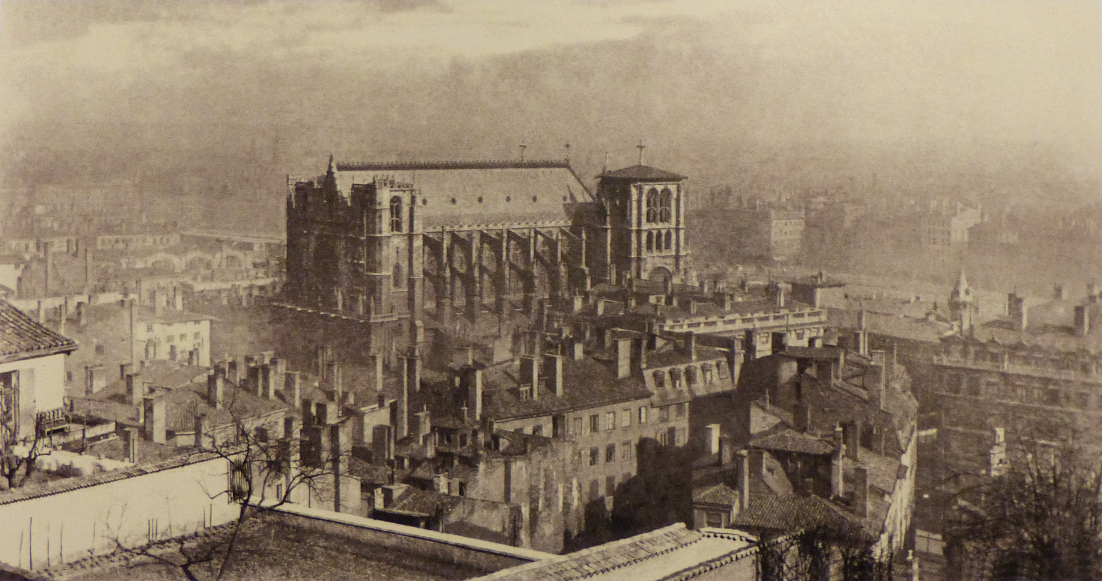 Le Vieux-Lyon et la Cathédrale Saint-Jean, surmontée de sa toiture surélevée réalisée par Antoine Desjardins.